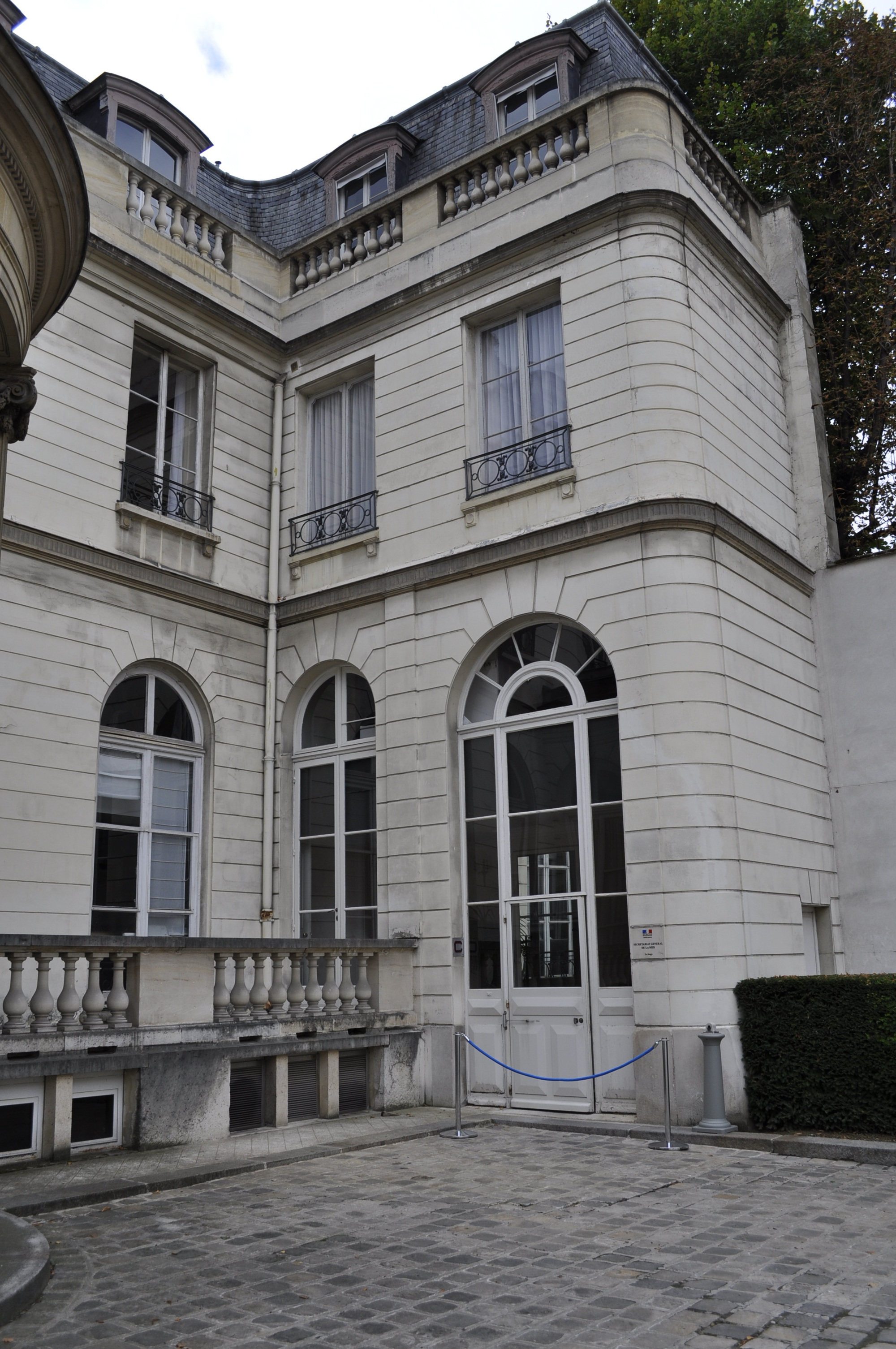 entrée du secrétariat général de la mer à l'hôtel de Clermont Photo prise lors des journées européennes du patrimoine 2015 .